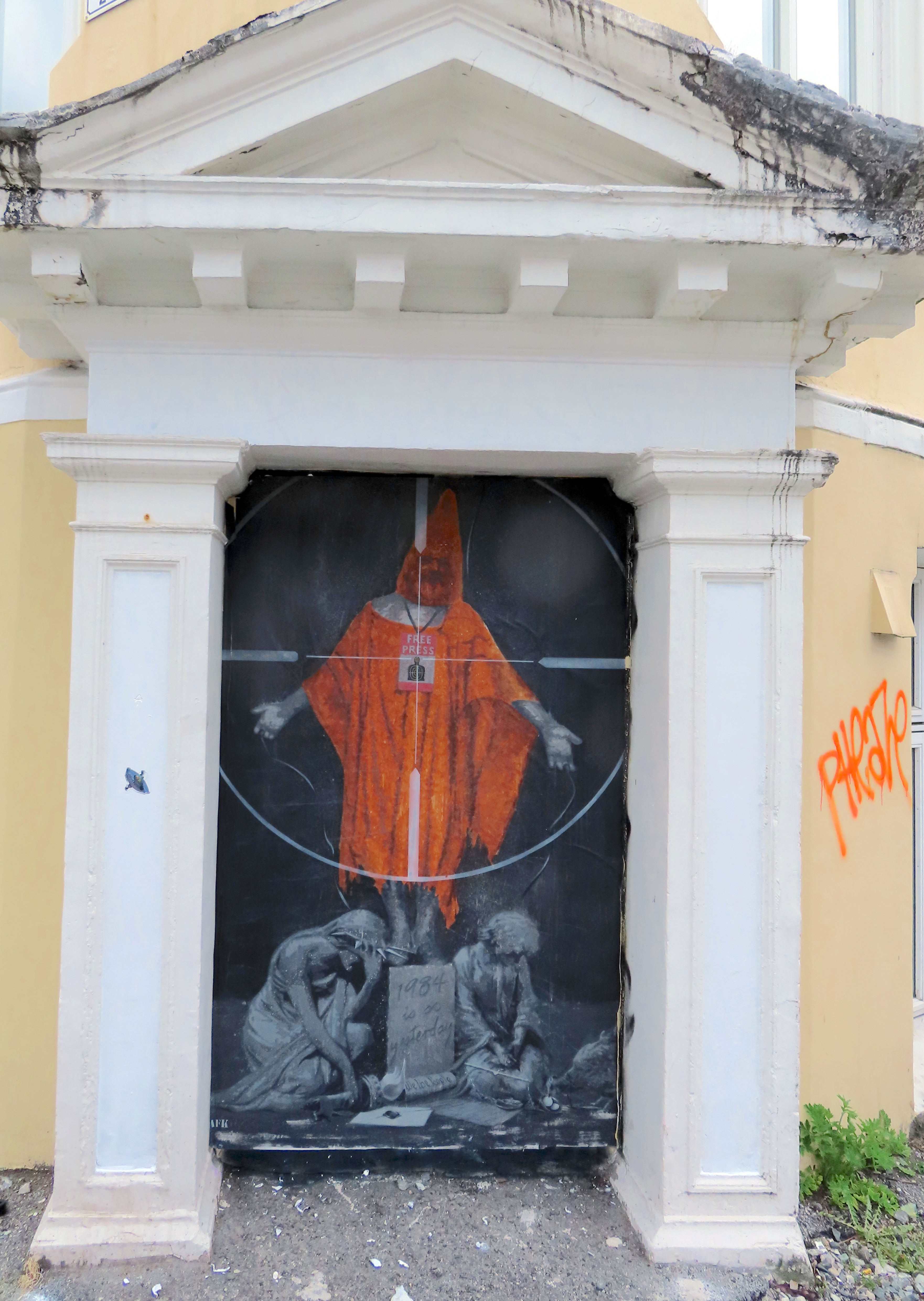 Street art Bergen